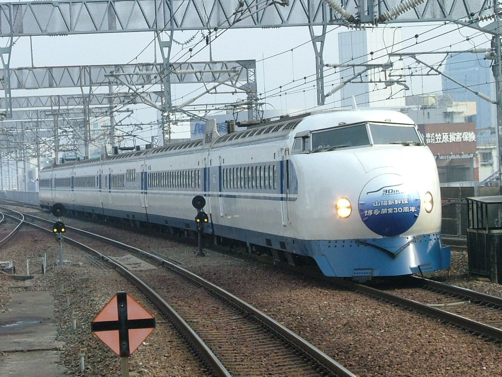 山陽新幹線全通30周年記念0系「ひかり」R18編成